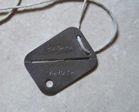 Magyarországi Személyi igazolójegy (Dögcédula)